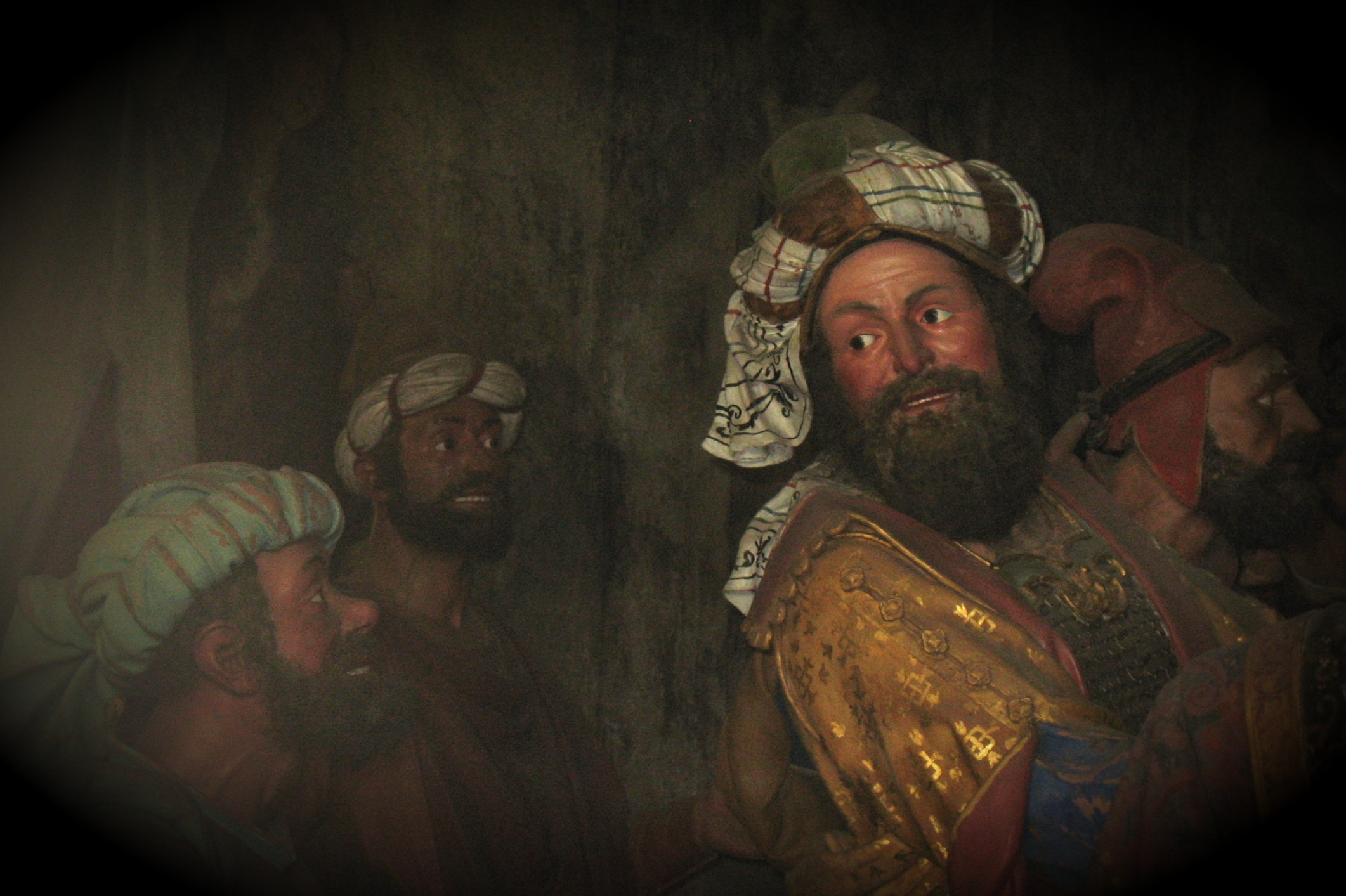 Sacro Monte di Varallo: particolare di una statua di Giovanni d'Enrico nella Cappella XXXV - Gesù condannato alla morte di croce (sfondo elaborato elettronicamente)